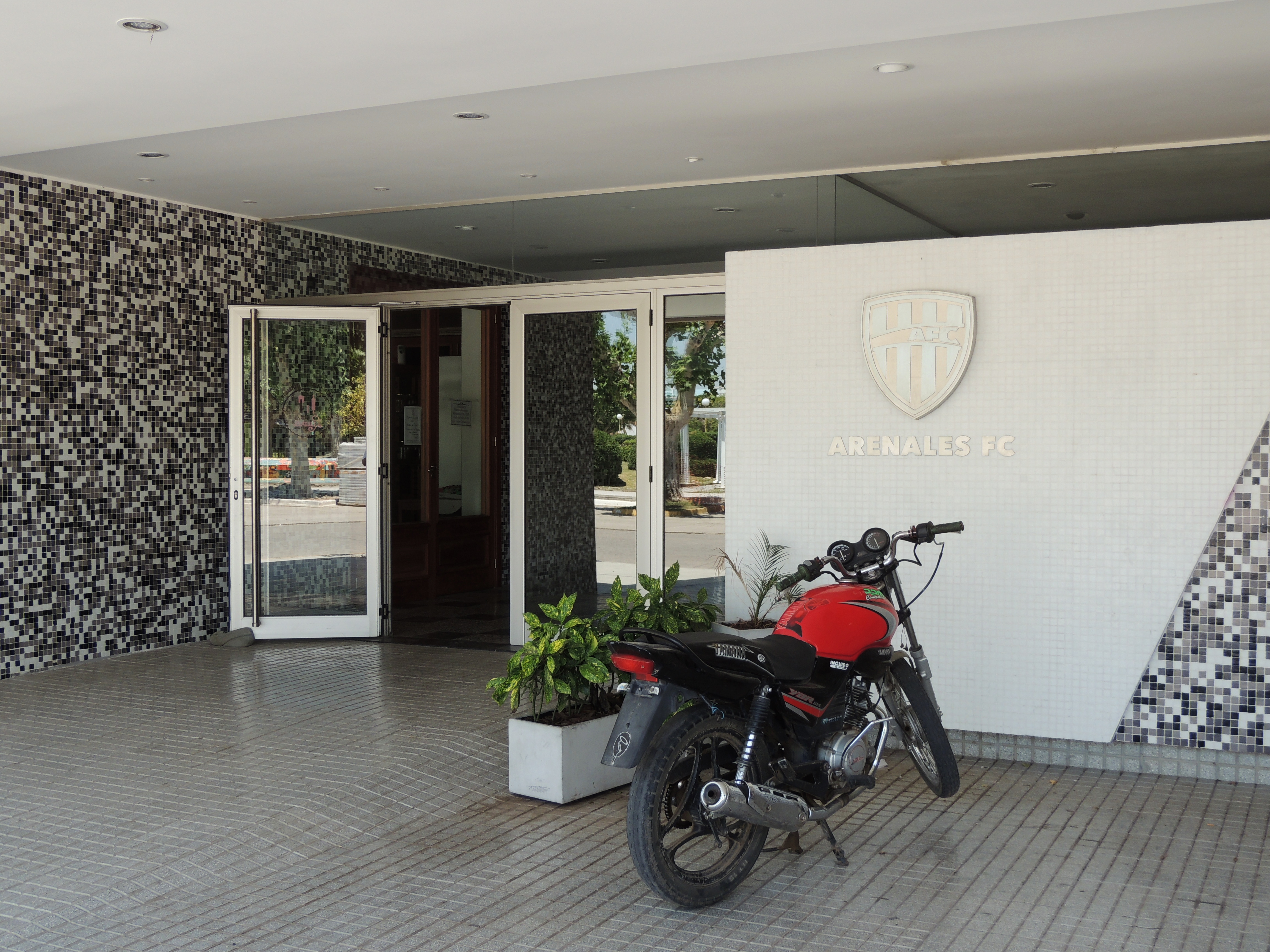 Club Arenales General Arenales, Buenos Aires, Argentina